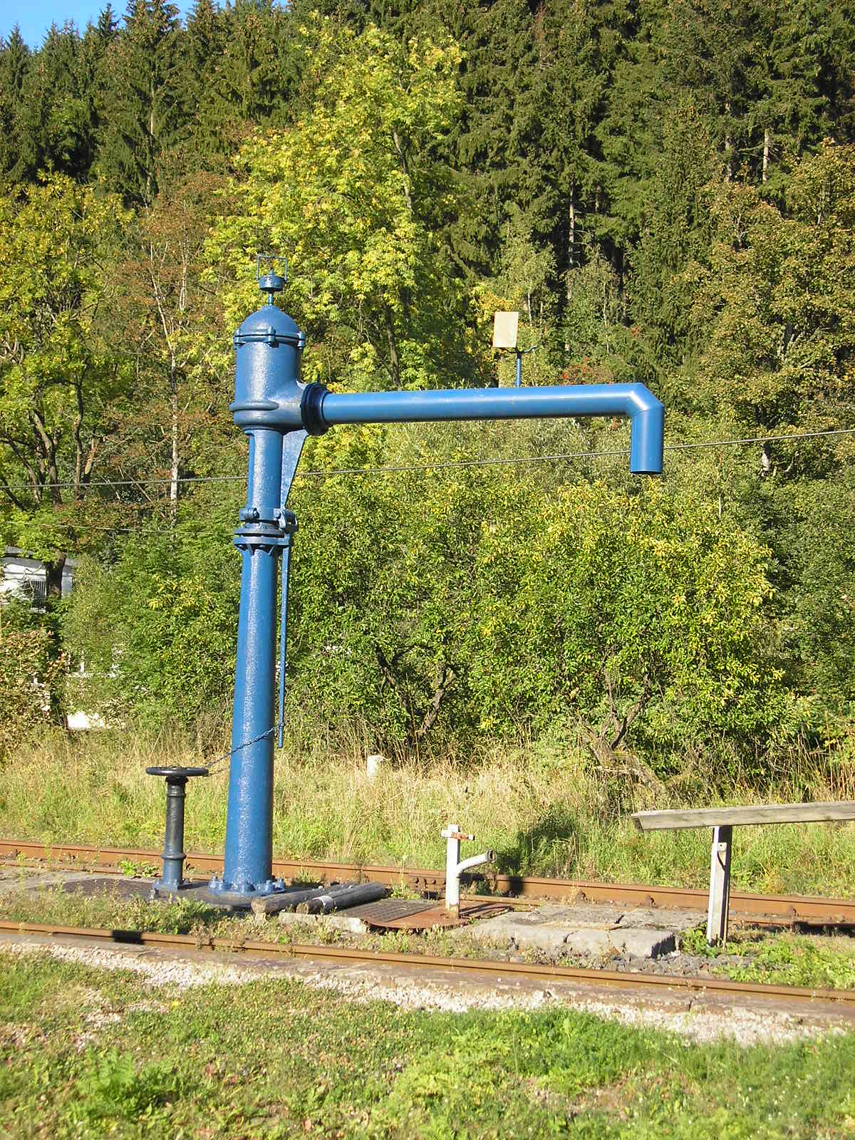 Wasserkran im Bahnhof Stützerbach (Thüringen).